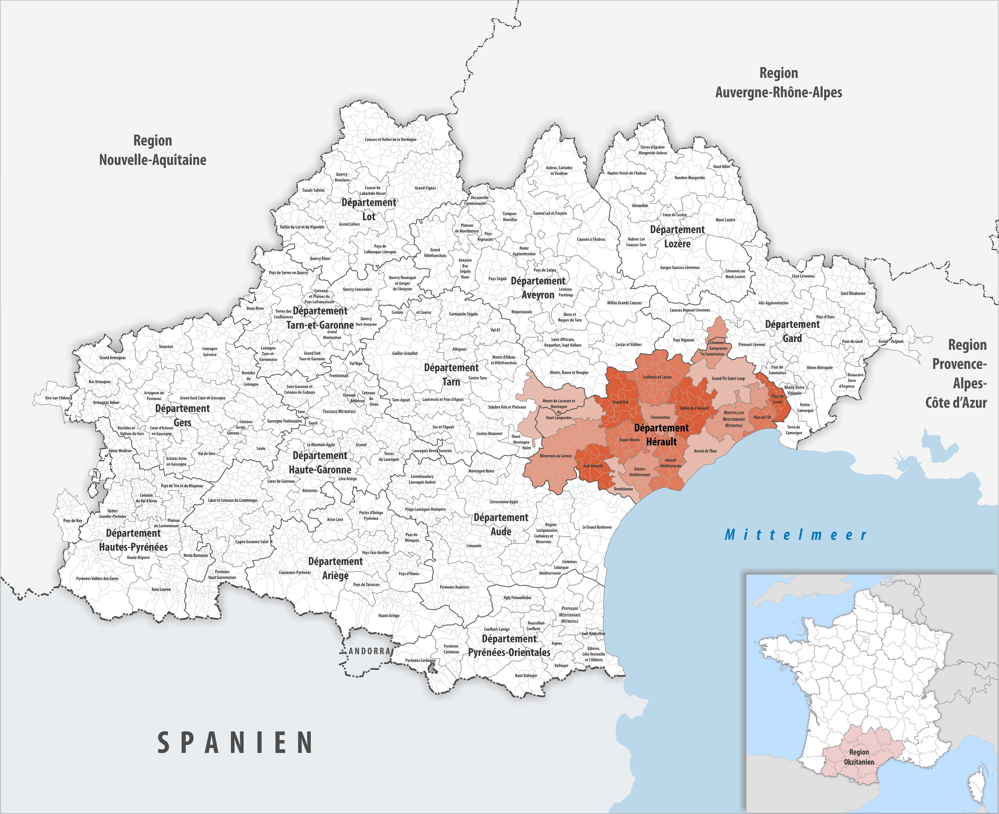 Gemeindeverbände im Département Hérault